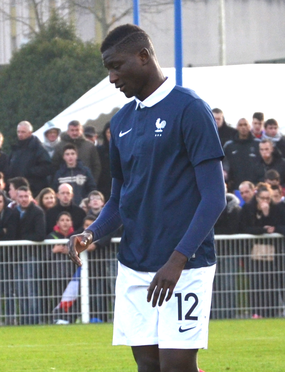 Photographie prise lors du match opposant la France à l'Angleterre pour les qualifications du championnat d'Europe de football des moins de 19 ans 2015 au stade Louis-Villemer de Saint-Lô le 31 mars 2015. Ici, Sehrou Guirassy.